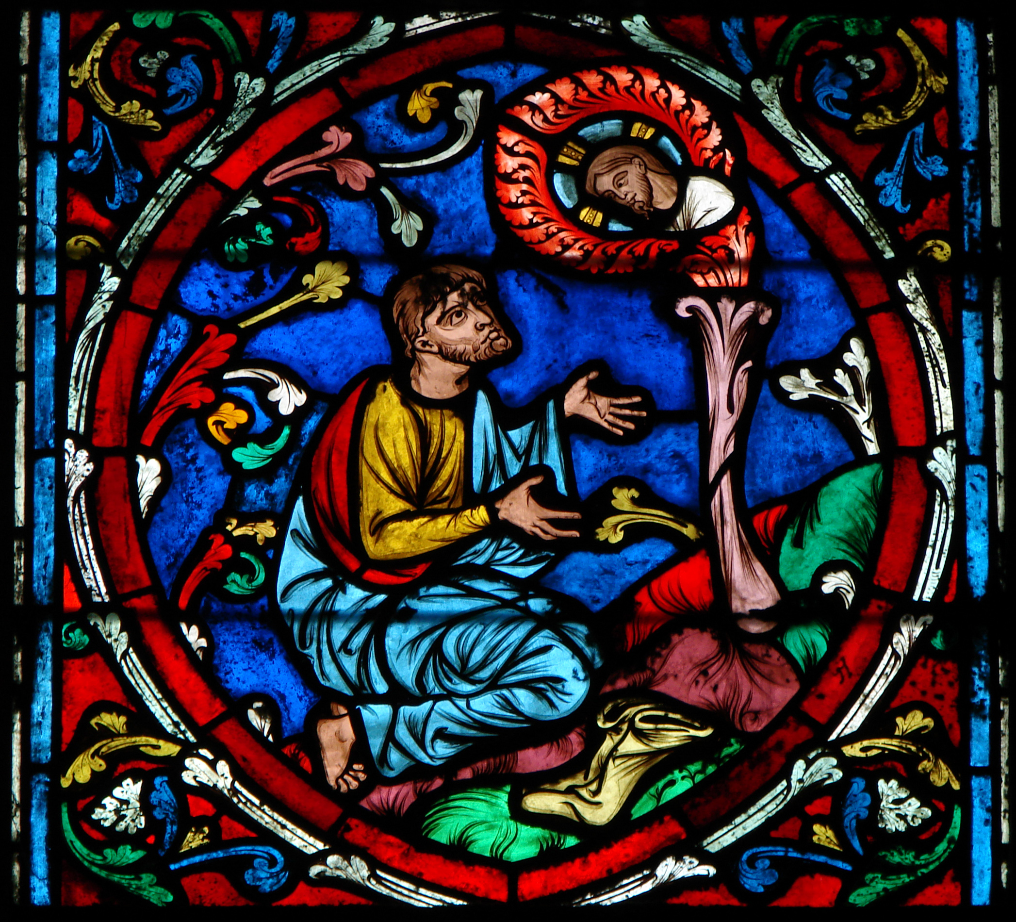 Vitrail de la cathédrale Notre-Dame de Paris: l'arbre de Jessé. Détail: Moïse (l'arbre de Jessé présente parfois, outre les ancêtres du Christ, des figures de l'Ancien Testament; il s'agit ici d'une figure latérale qui n'est pas au-dessus de Jessé). Vitrail signé par Didron et daté de 1864 (?), date de la fin de la campagne de restauration confiée à Viollet-le-Duc.